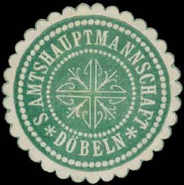 Sealing stamp Title: S. Amtshauptmannschaft Döbeln Description: grün, weiß, geprägt Place: Döbeln size: 4 cm